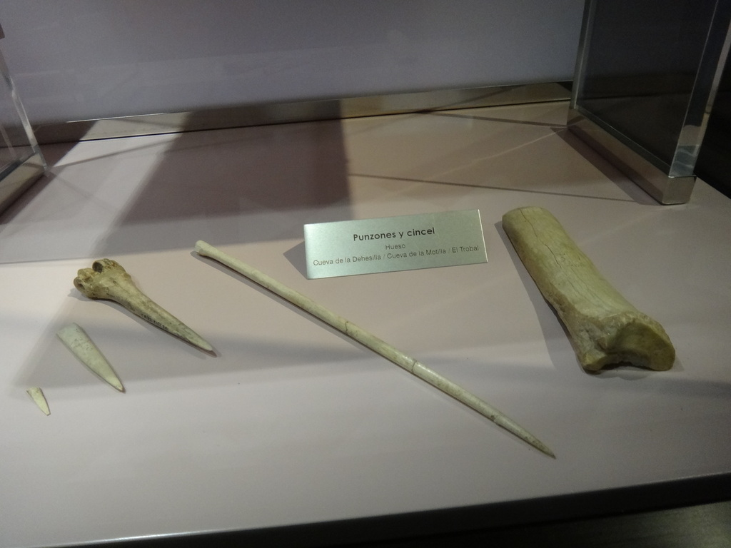 Museo Arqueológico de Jerez de la Frontera (Andalucía, España).